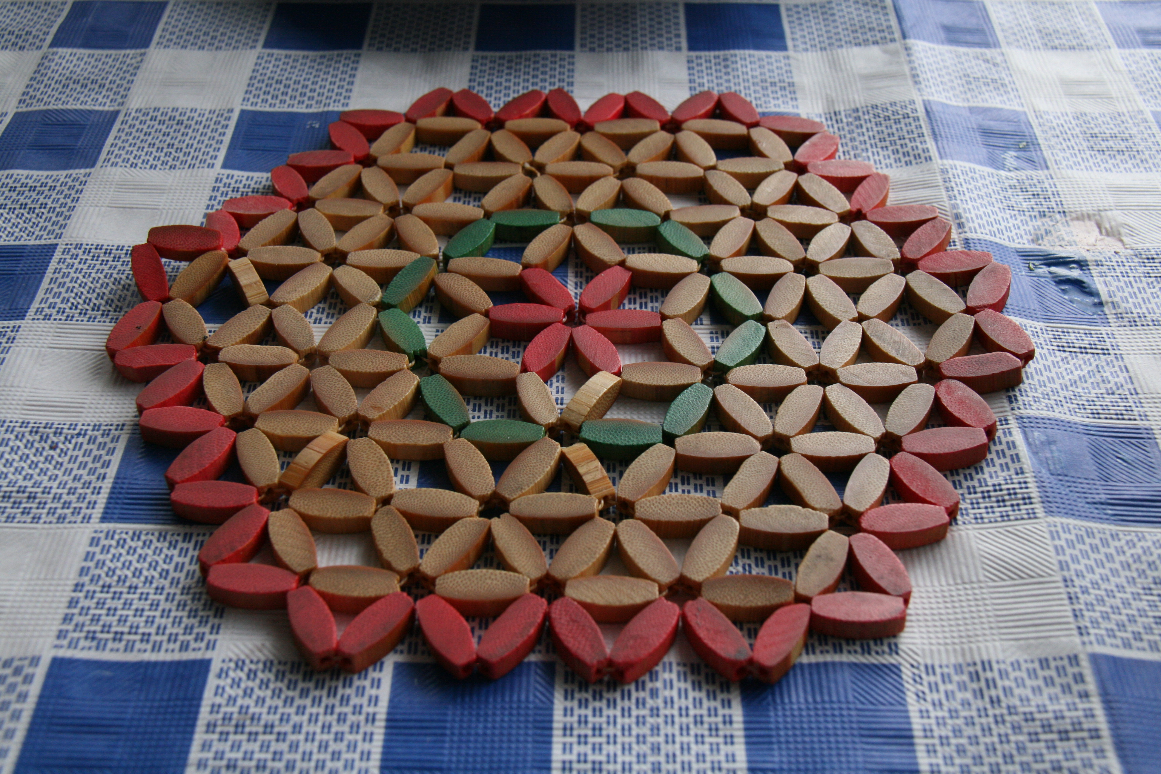 Salvamanteles